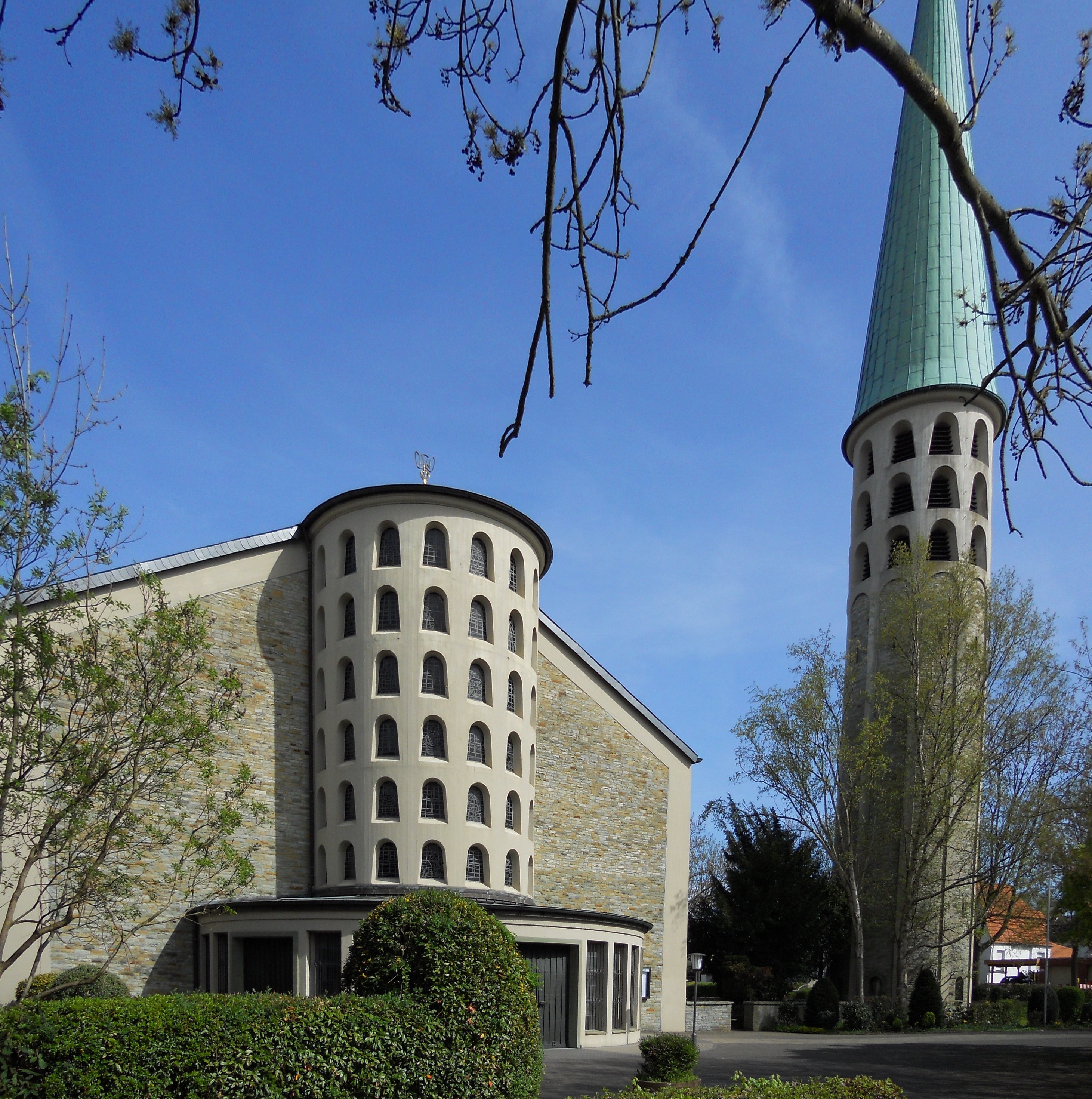 Werl, Sankt-Norbert-Kirche, Außenansicht